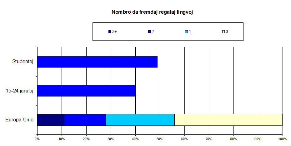 Grafiko montranta la nombron da fremdlingvoj regataj de pridemandataj civitanoj de Eŭropa Unio. Kompare aperas la proporcio da studentoj kaj da junuloj regantaj du fremdajn lingvojn. Propra laboro sub GFDL. Fonto: Europeans and their languages, Eurobarometer, februaro 2006. Kategorio:Lingvoj de Eŭropo